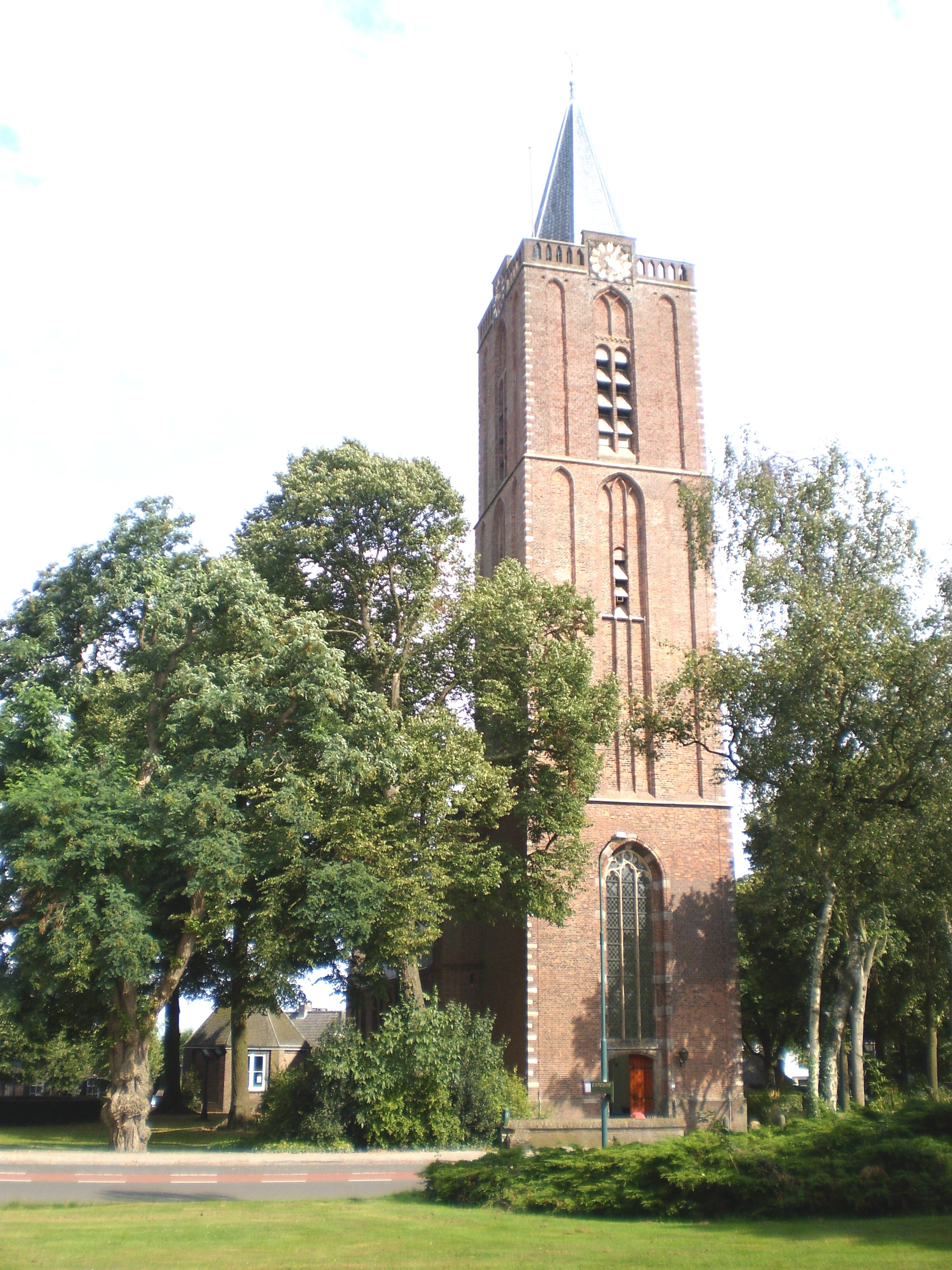 foto oanbean troch Swarte Kees op 18 augustus 2009